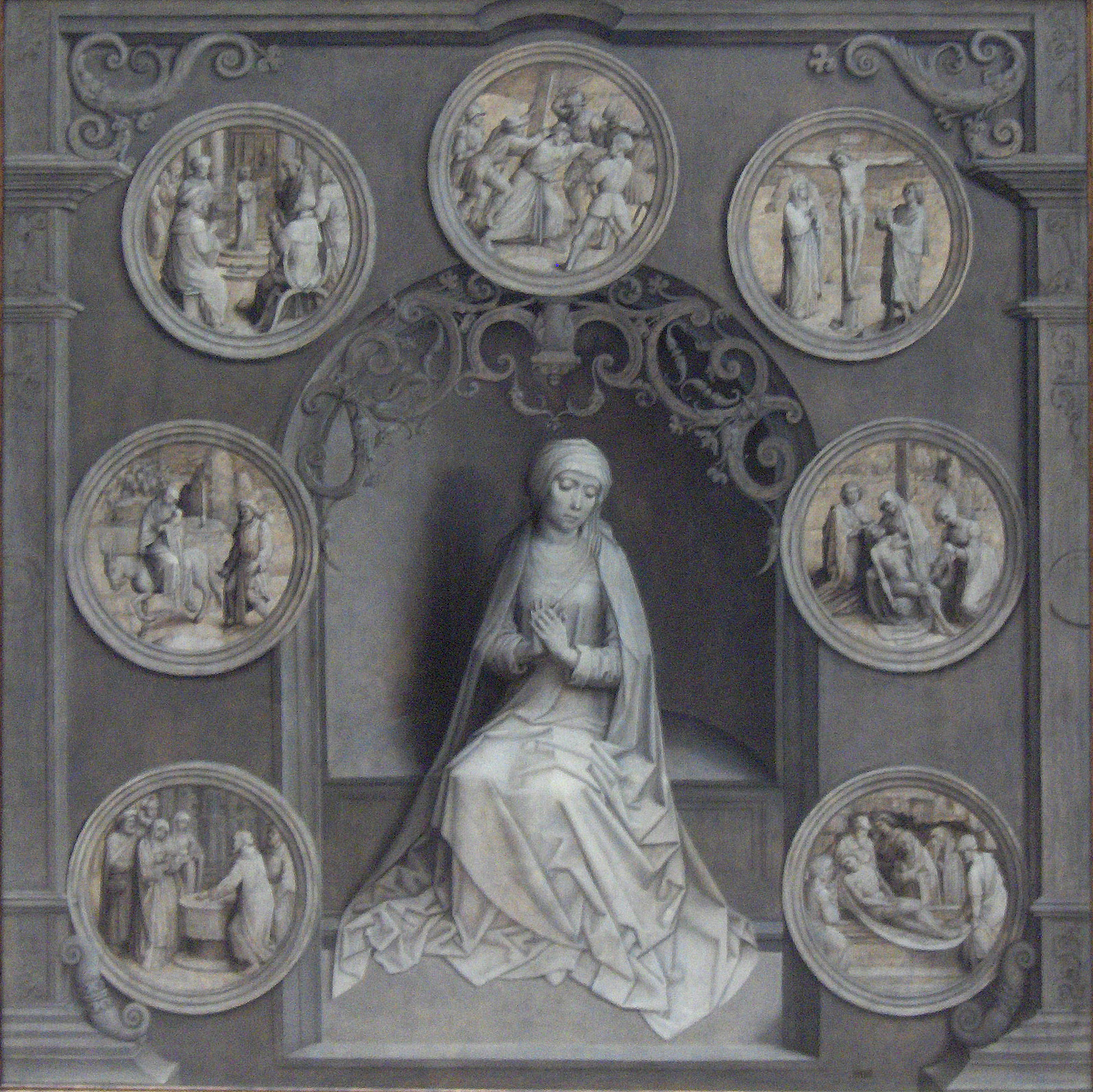 Linkerluik van een diptiek Onze-Lieve-Vrouw der Zeven Weeëntitle QS:P1476,nl:"Linkerluik van een diptiek Onze-Lieve-Vrouw der Zeven Weeën" label QS:Lnl,"Linkerluik van een diptiek Onze-Lieve-Vrouw der Zeven Weeën"